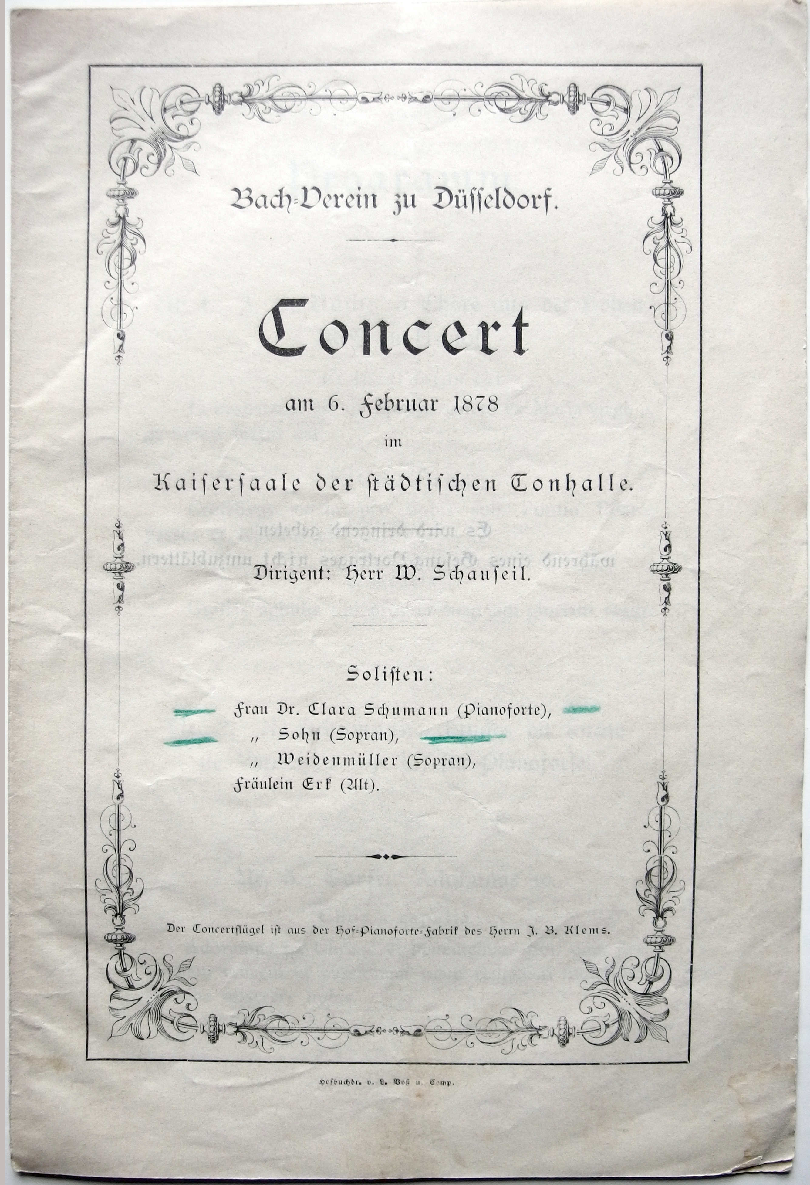 Bach-Verein zu Düsseldorf, Programm: Concert am 20. Oktober 1878, im Kaisersaal der städtischen Tonhalle, Dirigent: W. Schauseil, Solisten: Dr. Clara Schumann (Pianoforte), Frau Sohn (Sopran), Frau Weidenmüller (Sopran), Fräulein Ert (Alt)